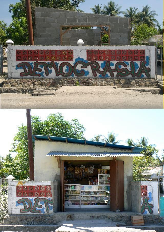 Dili Wandbild, vgl. File:Timor Demokratie 2